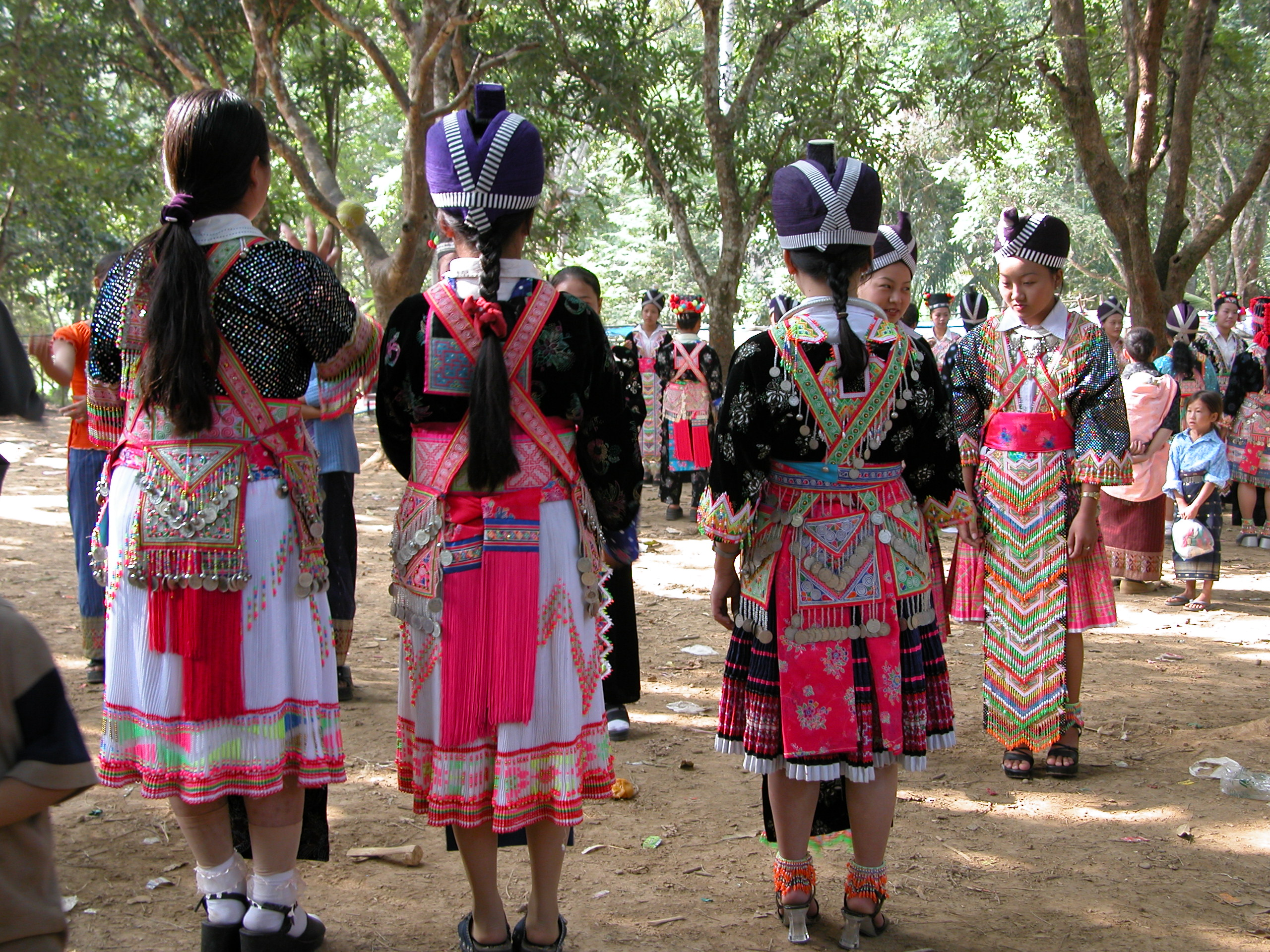 laos luang prabang, fete de rencontre hmong